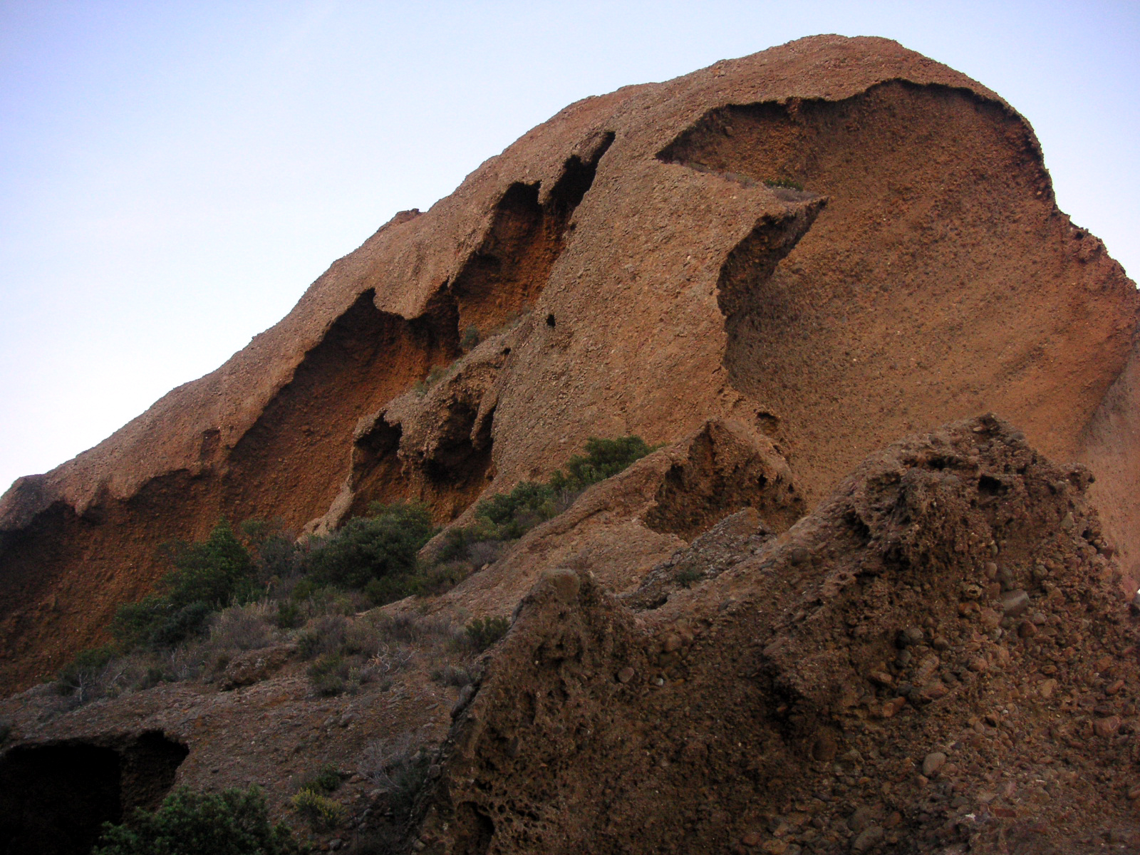 Paroi rocheuse du pic de l'aigle de La Ciotat (13), France.